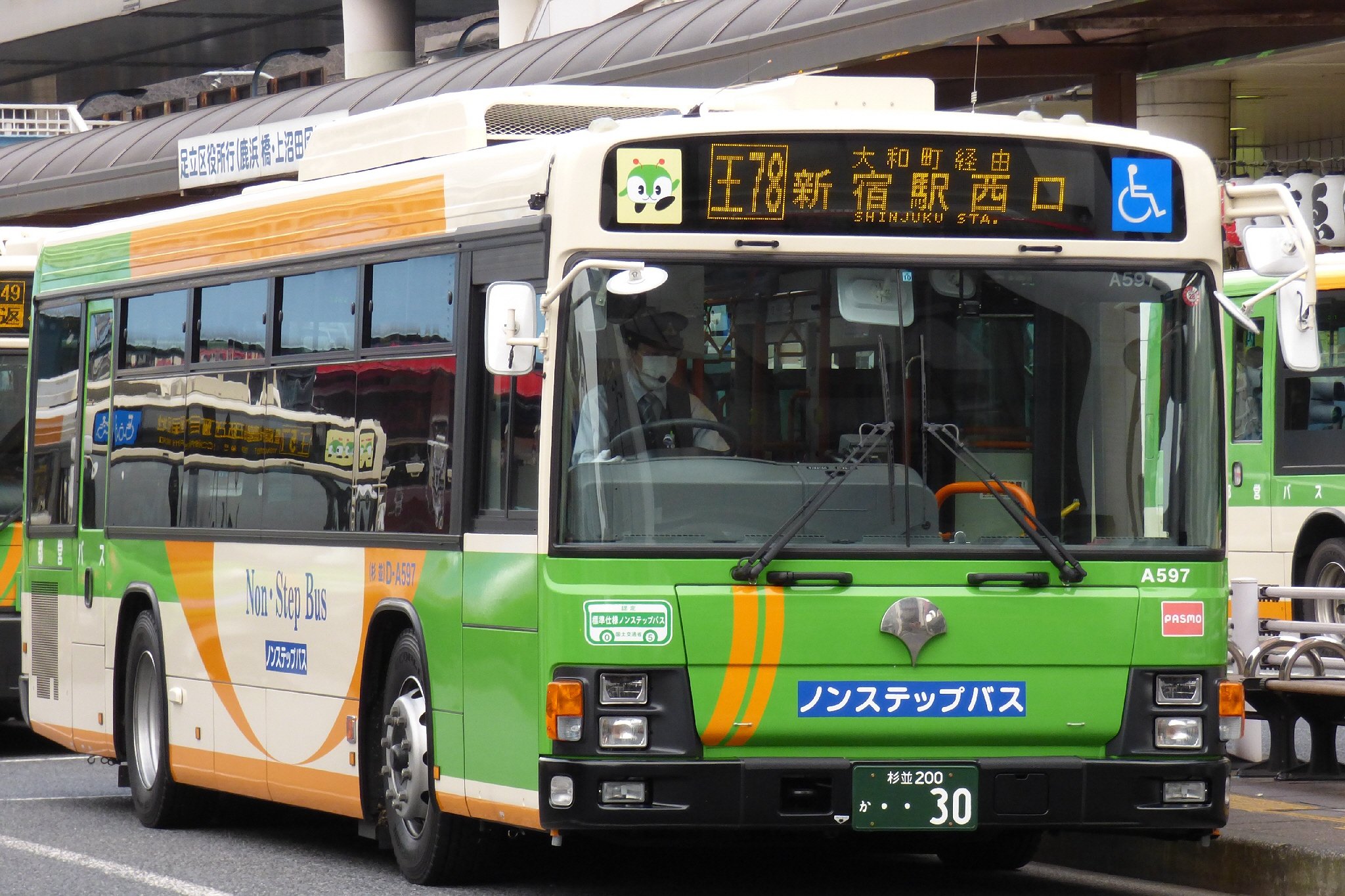 都営バス杉並支所のA代(D-A597)